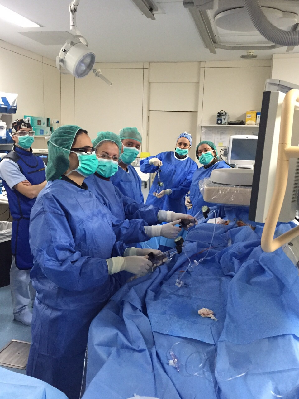 Trabajo en equipo en una sala de Radiología Intervencionista